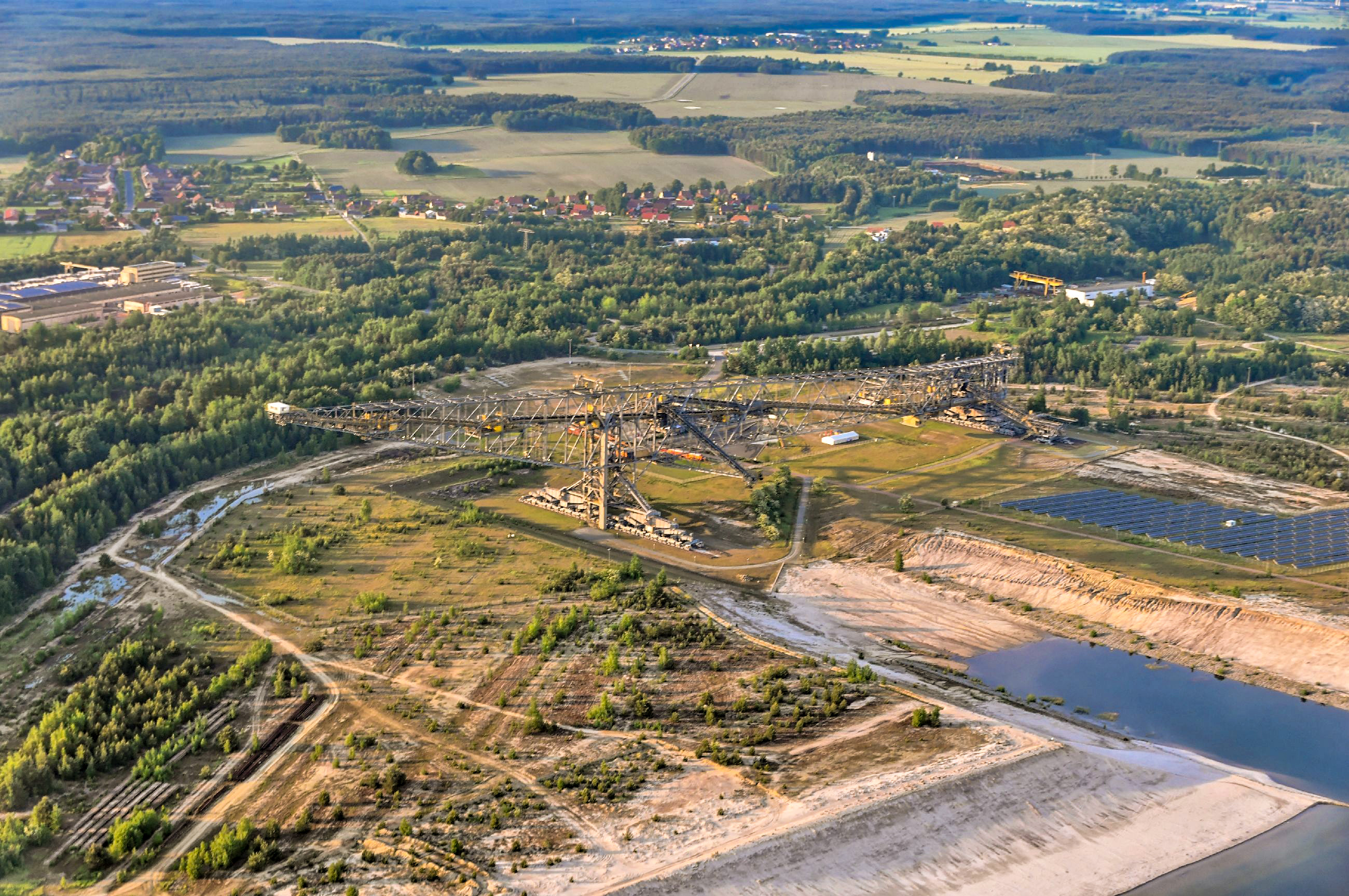 Luftaufnahme Besucherbergwerk Abraumförderbrücke F60; Überführungsflug vom Flugplatz Nordholz-Spieka über Lüneburg, Potsdam zum Flugplatz Schwarzheide-Schipkau